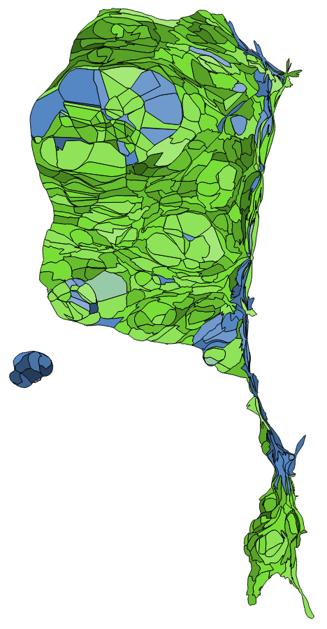 顏色對照表